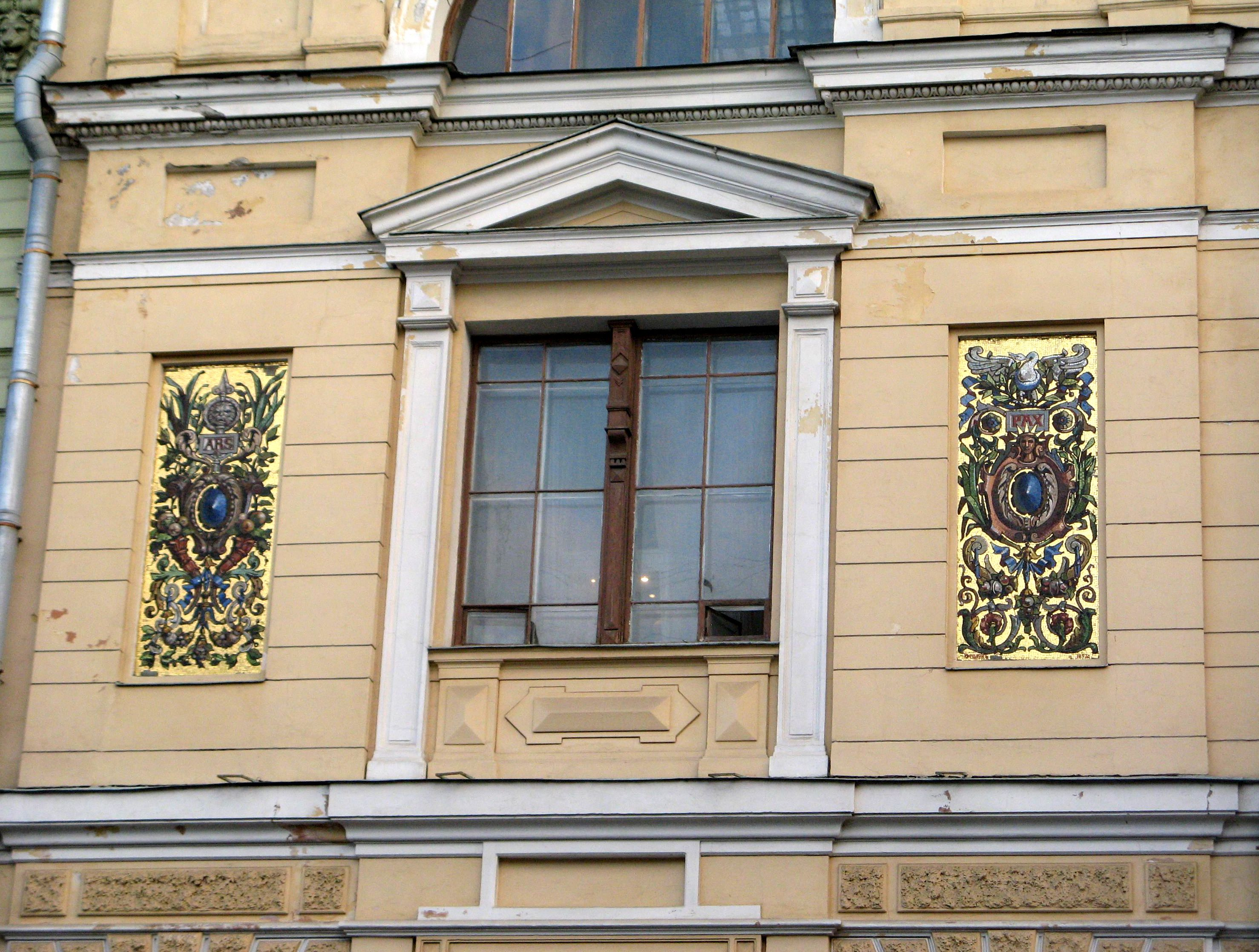 Дом Общества поощрения художеств с дворовыми флигелями (Санкт-Петербург и Лен.область, Санкт-Петербург, Большая Морская улица, 38, р. Мойки наб., 83)